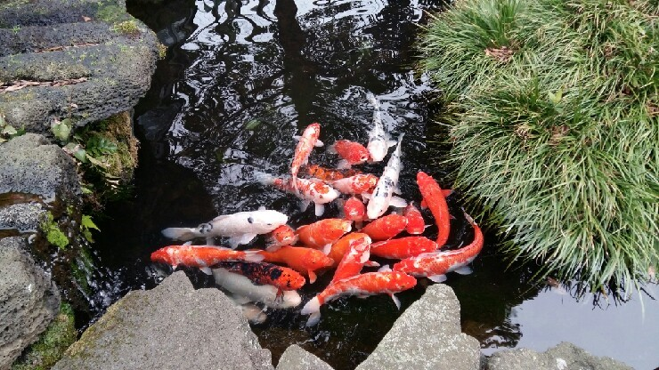 조선말: 제주 한림공원 내의 물고기들을 촬영